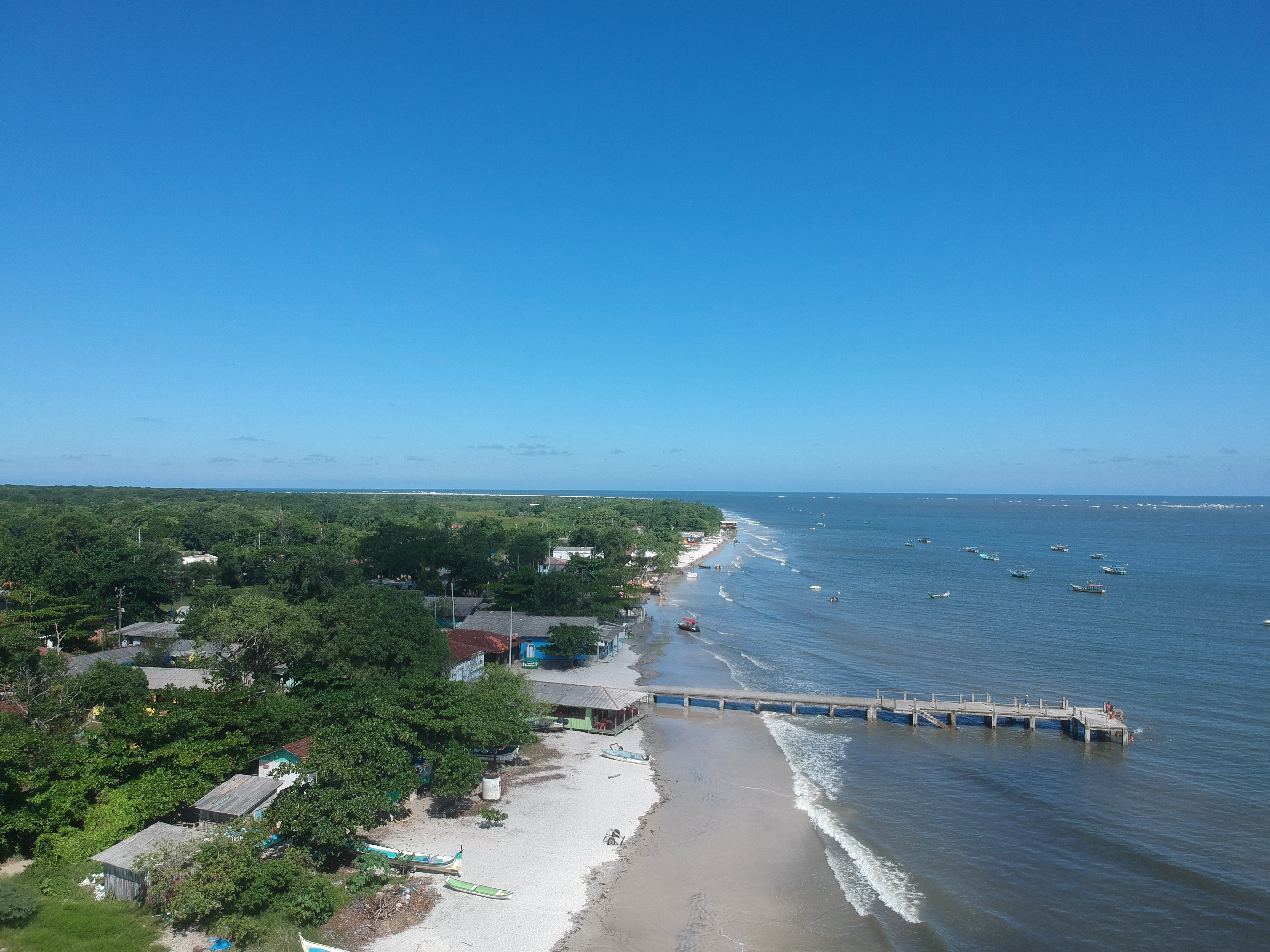 Imagem aérea feita de Ilha de Superagui